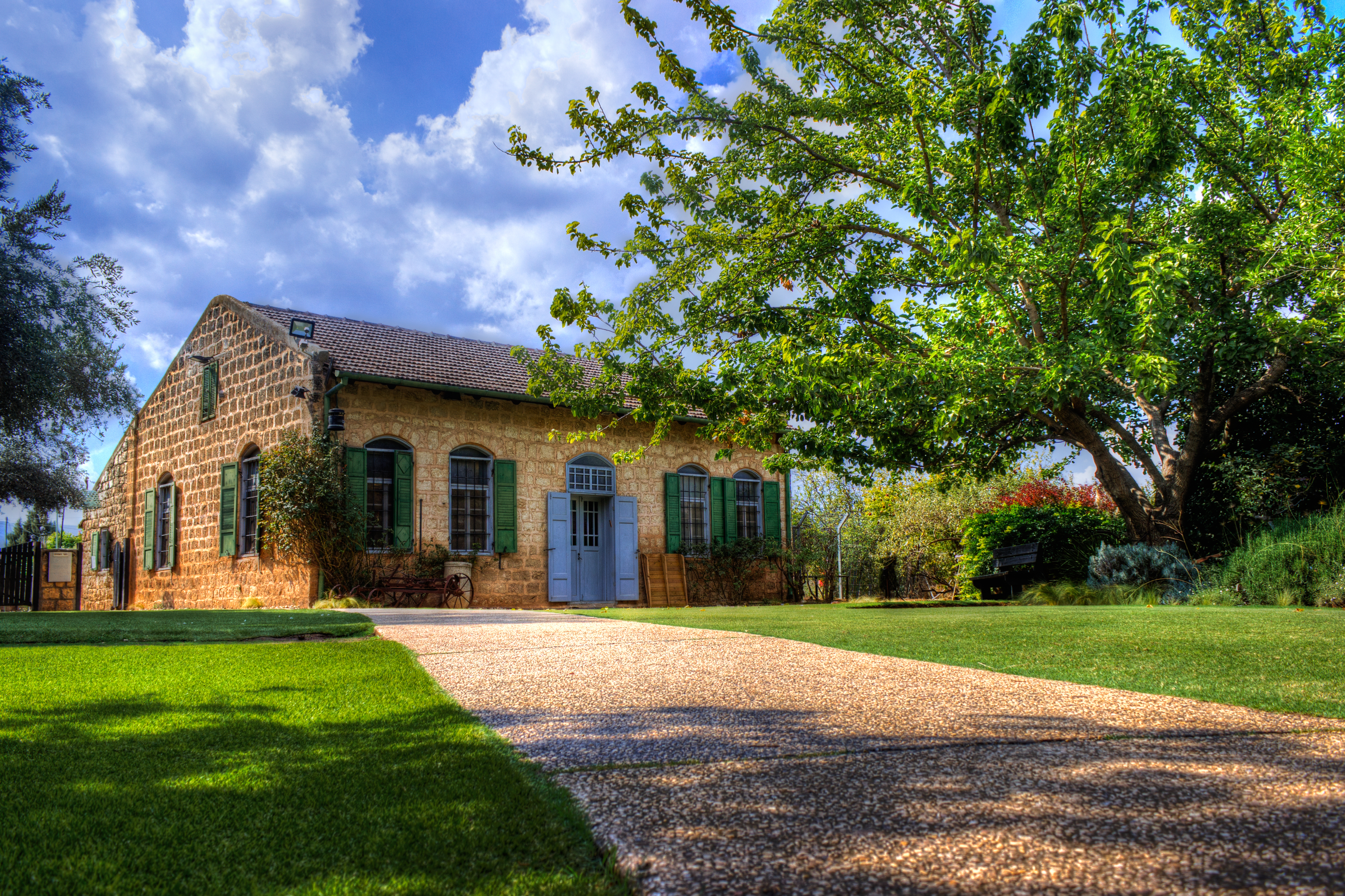 בשנת 1909 התיישב ביסוד העלה יואב דוברובין ומשפחתו. בעזרת הידע הרב בחקלאות הקימה משפחת דוברבין חצר אחוזה גדולה ובה משק משגשג. בשנת 1982 הפך המקום למוזיאון.